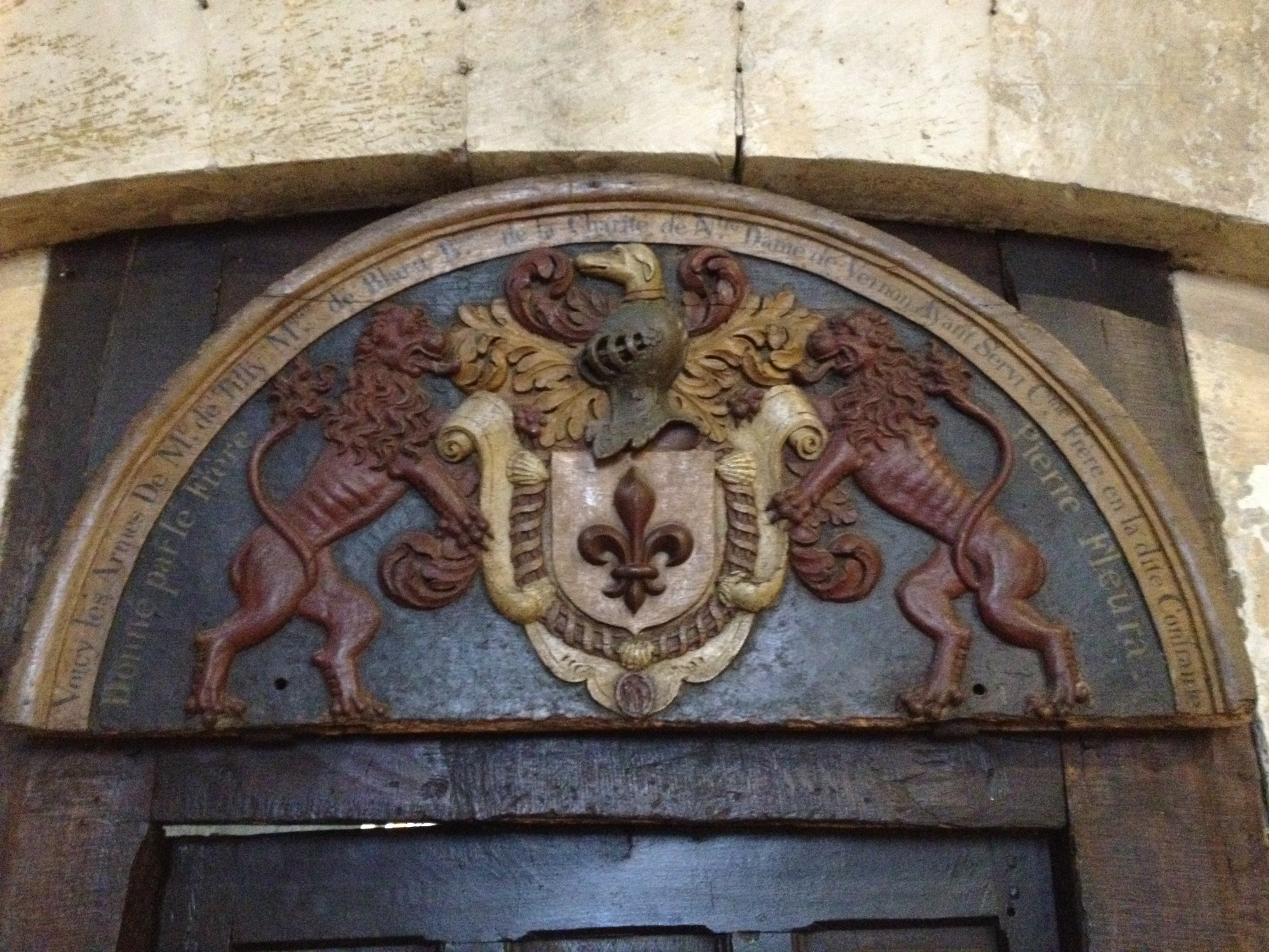 Armoiries sur le dessus d'une porte de M. de Tilly, marquis de Blaru.